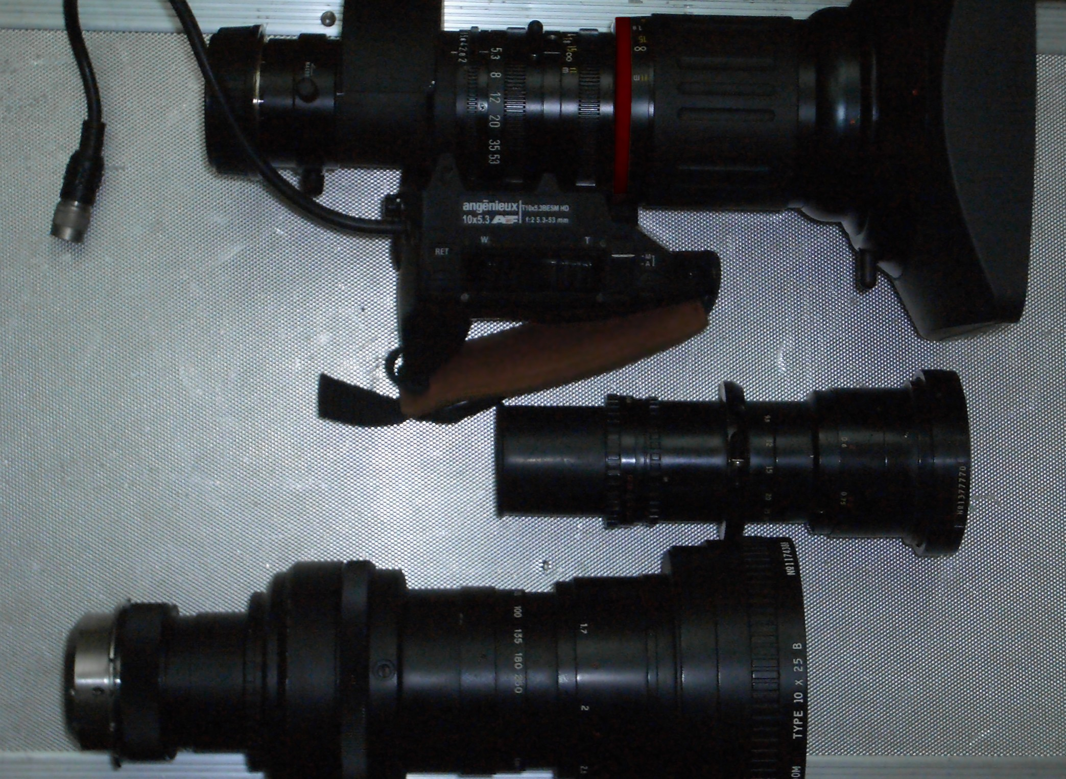 16 35 and 2/§ Angenieux Lenses